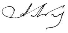 Подпись Лобановского Александра Николаевича